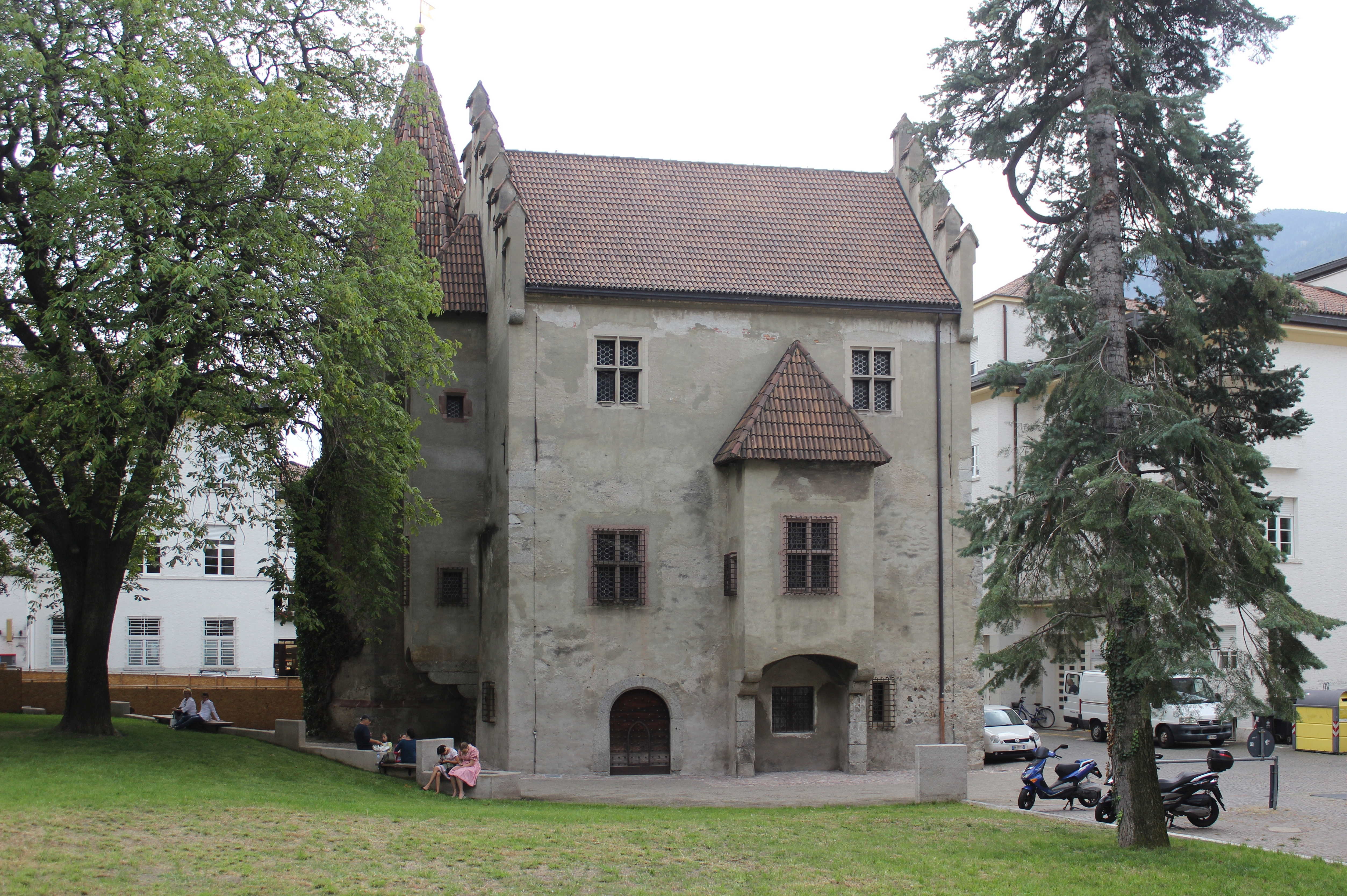 Landesfürstliche Burg in Meran